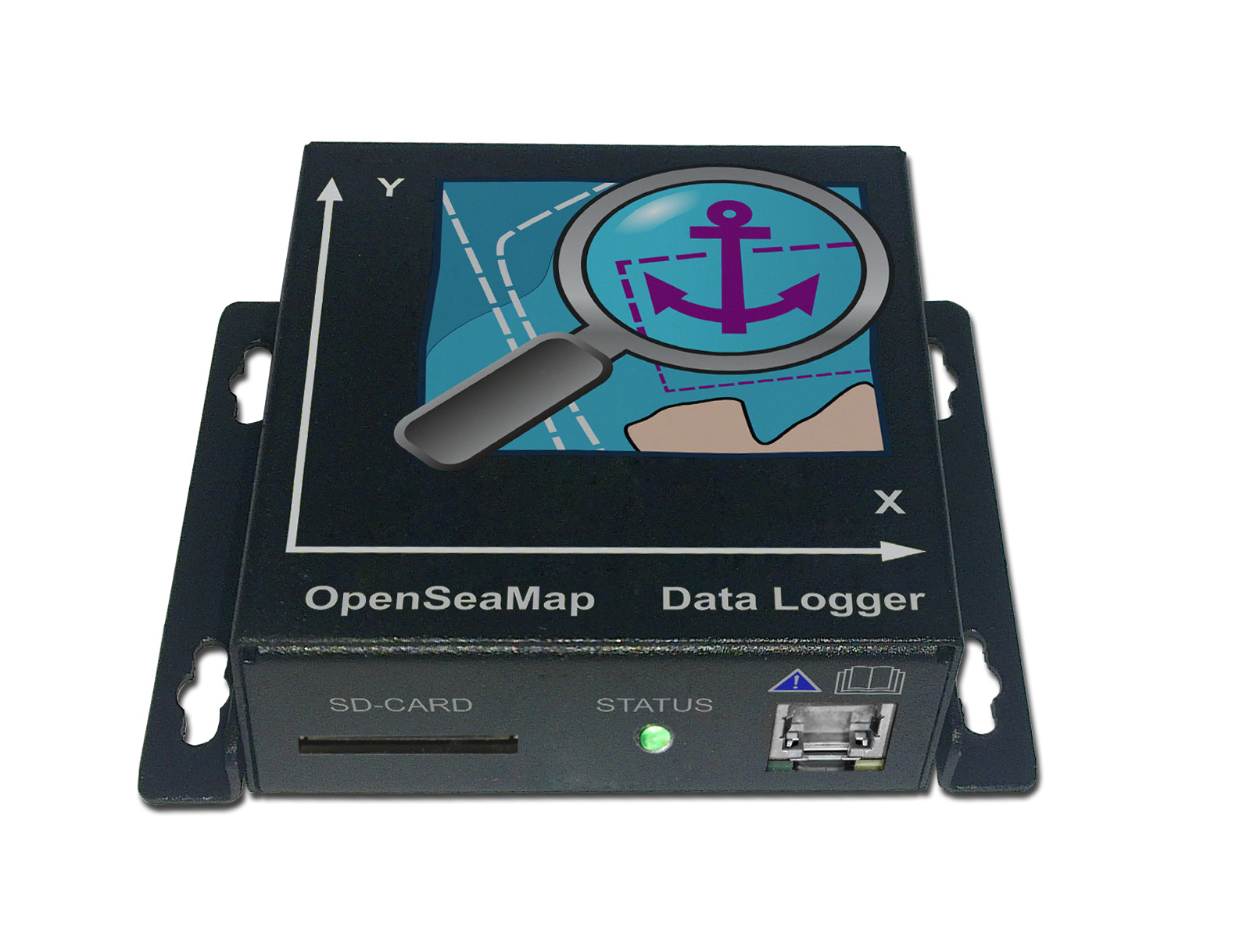 Tiefendaten-Logger für das Projekt OpenSeaMap. Vorabkomposition der geplanten Bedruckung und Schnittstellen-Bestückung.